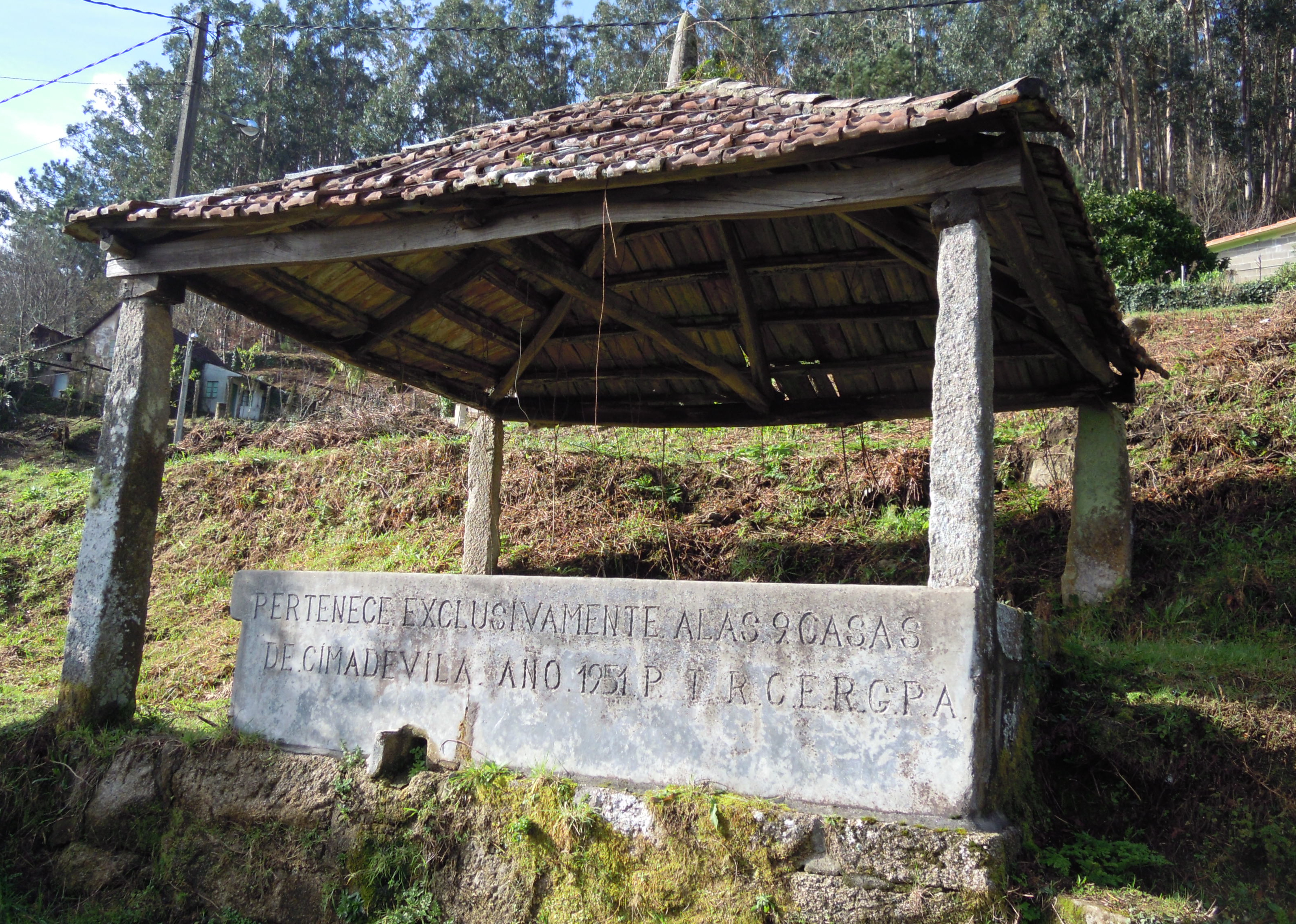 Lavadoiro en Cimadevila (Vilaboa, Vilaboa).